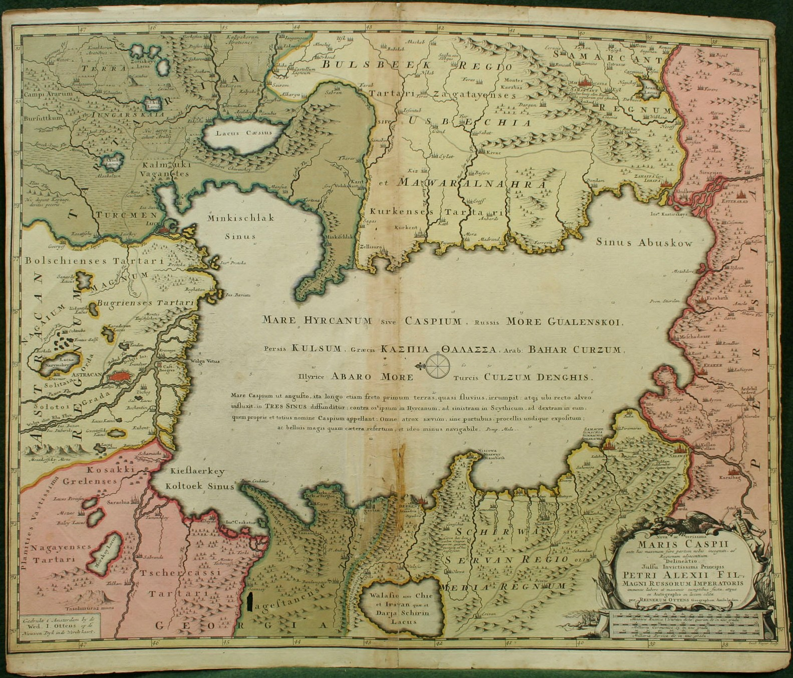 Nova ac verissima Maris Caspii ante hac maximam fere partem nobis incogniti ac regionum adjacentium delineatio: jussu invictissimi principis Petri Alexii fil. magni Russorum imperatoris / immenso labore et maximis sumptibus facta, atque ex autographo in lucem edita per Reinerum Ottens geographum Amstelaedam; Iacob Keyser sculp. (Full magnitudine 528×605 millimetrorum)